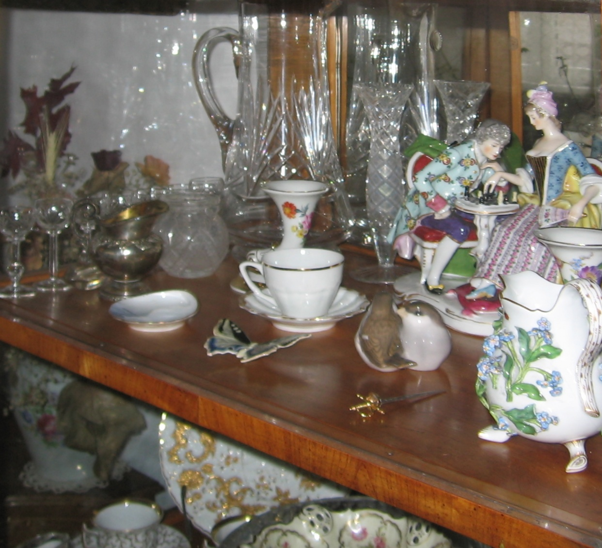 bibelots